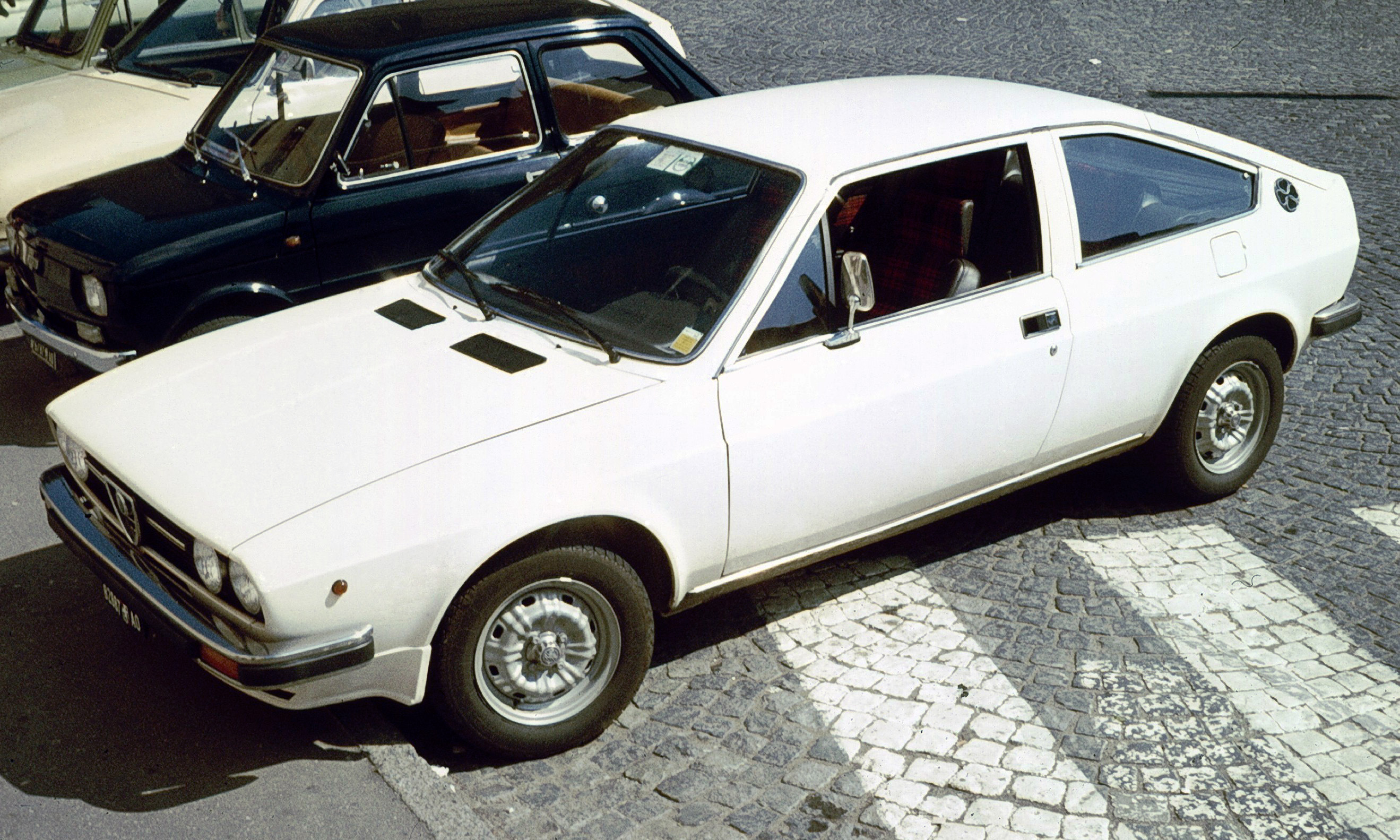 Alfasud Coupe